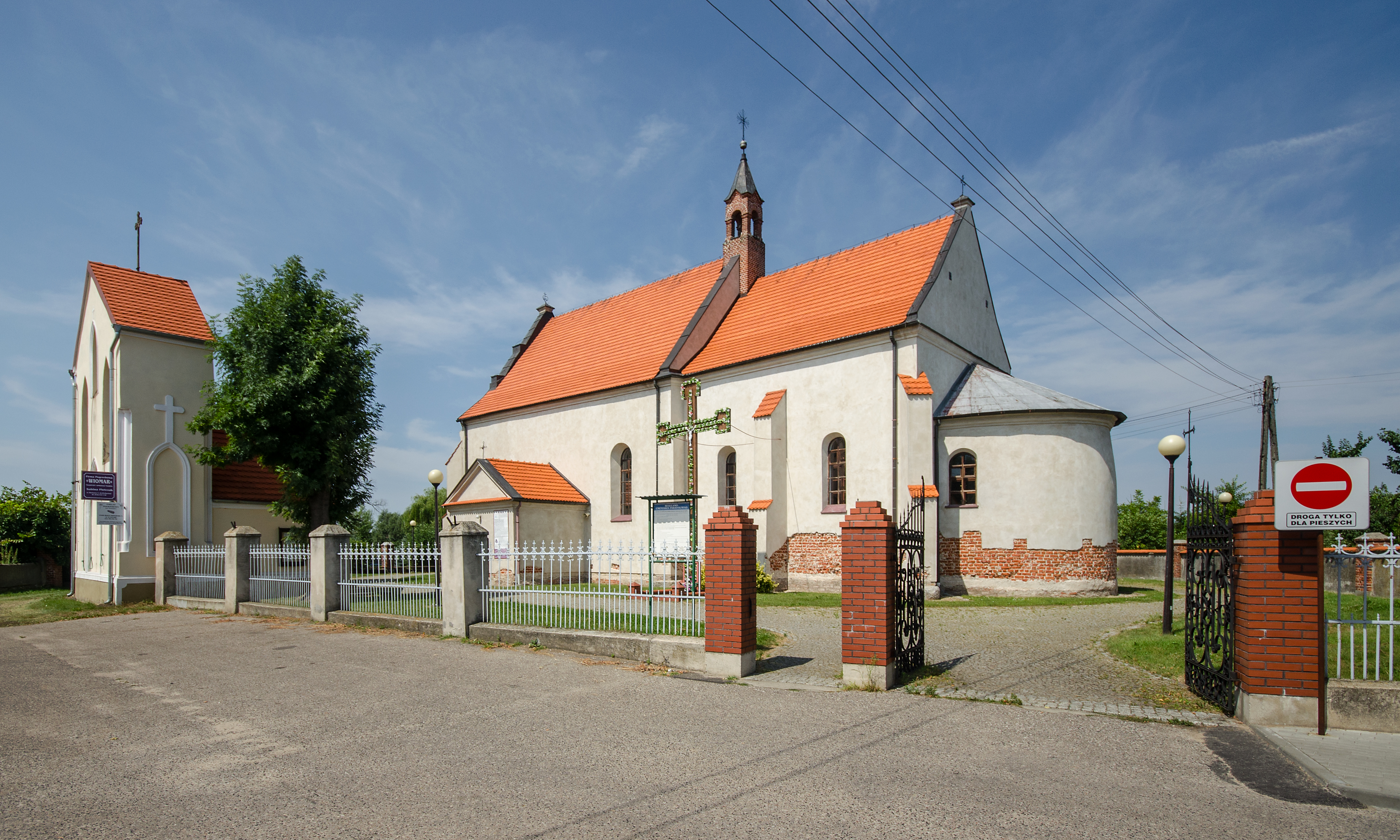 Rychwał, kościół par. p.w. Św. Trójcy, 1476, 1574, 1790-1800, 1874